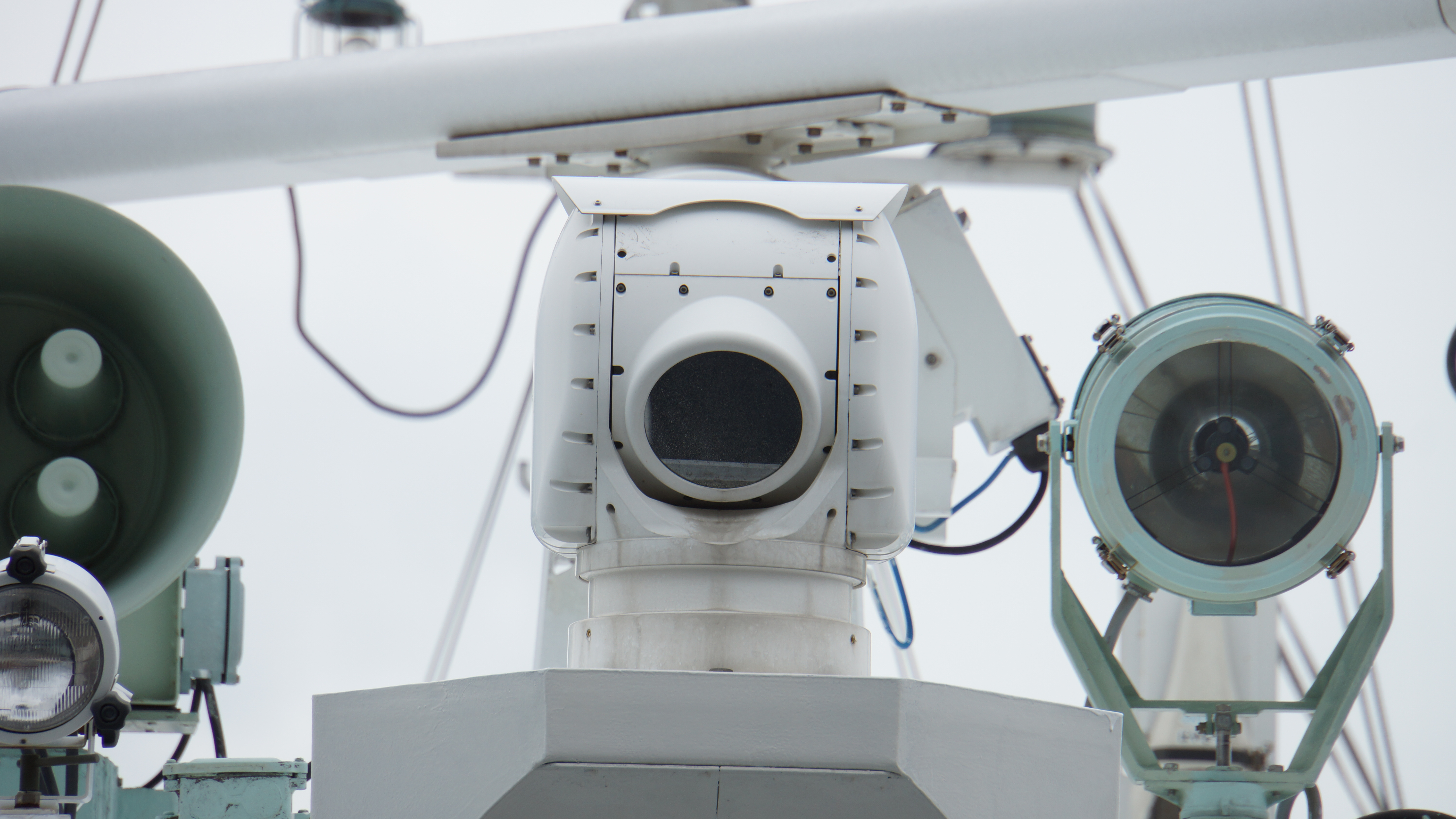 海上保安庁 巡視船はやぎく（CL-07） 操舵室上の夜間暗視装置（FLIR） 正面。2016年9月22日 門司港にて。